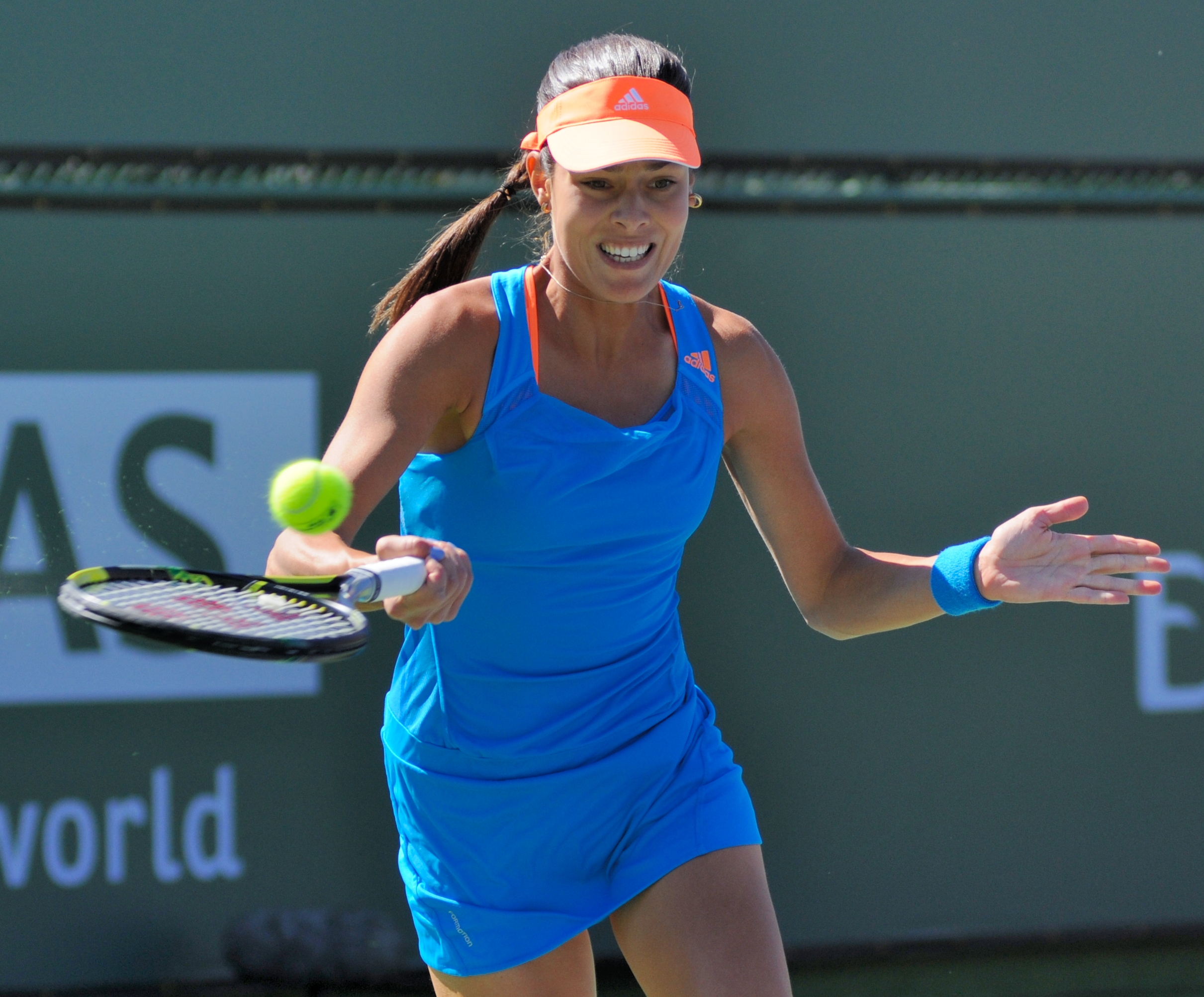 2014 BNP Paribas Open